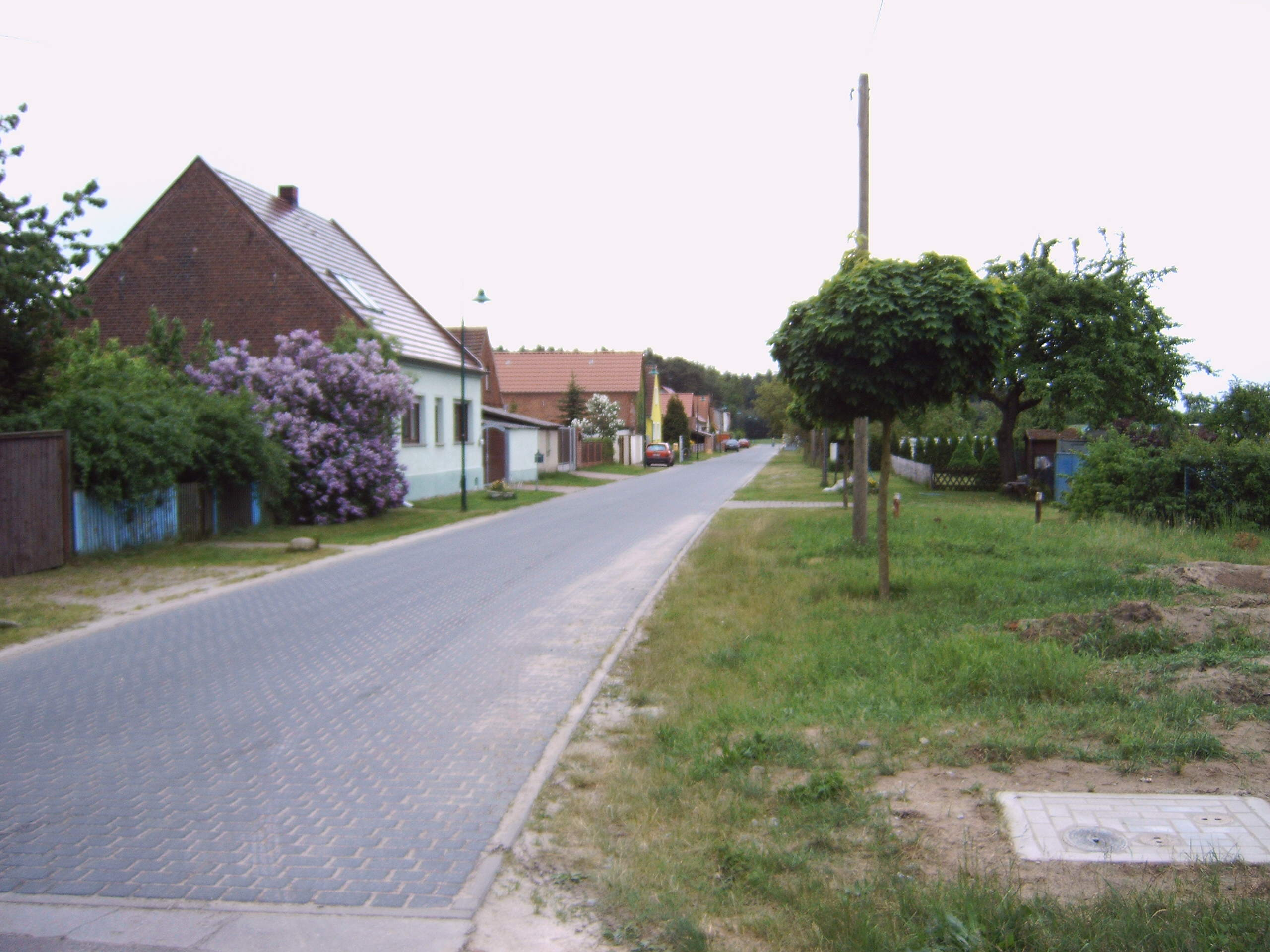 Wiechenberg, Ortsteil von Genthin, Sachsen-Anhalt, Deutschland Bild aufgenommen am 22.5.2006 von Olaf Meister